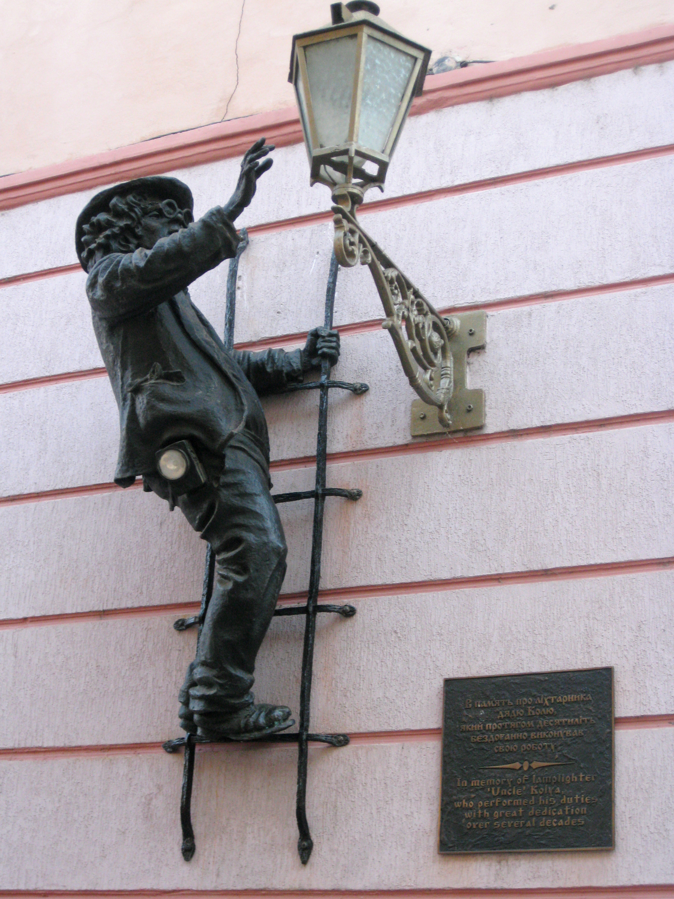 Комплекс Замкової гори, Ужгород, В межах вул. Корзо, вул. Підграцька, пл. Корятовича, Ботанічна набережна